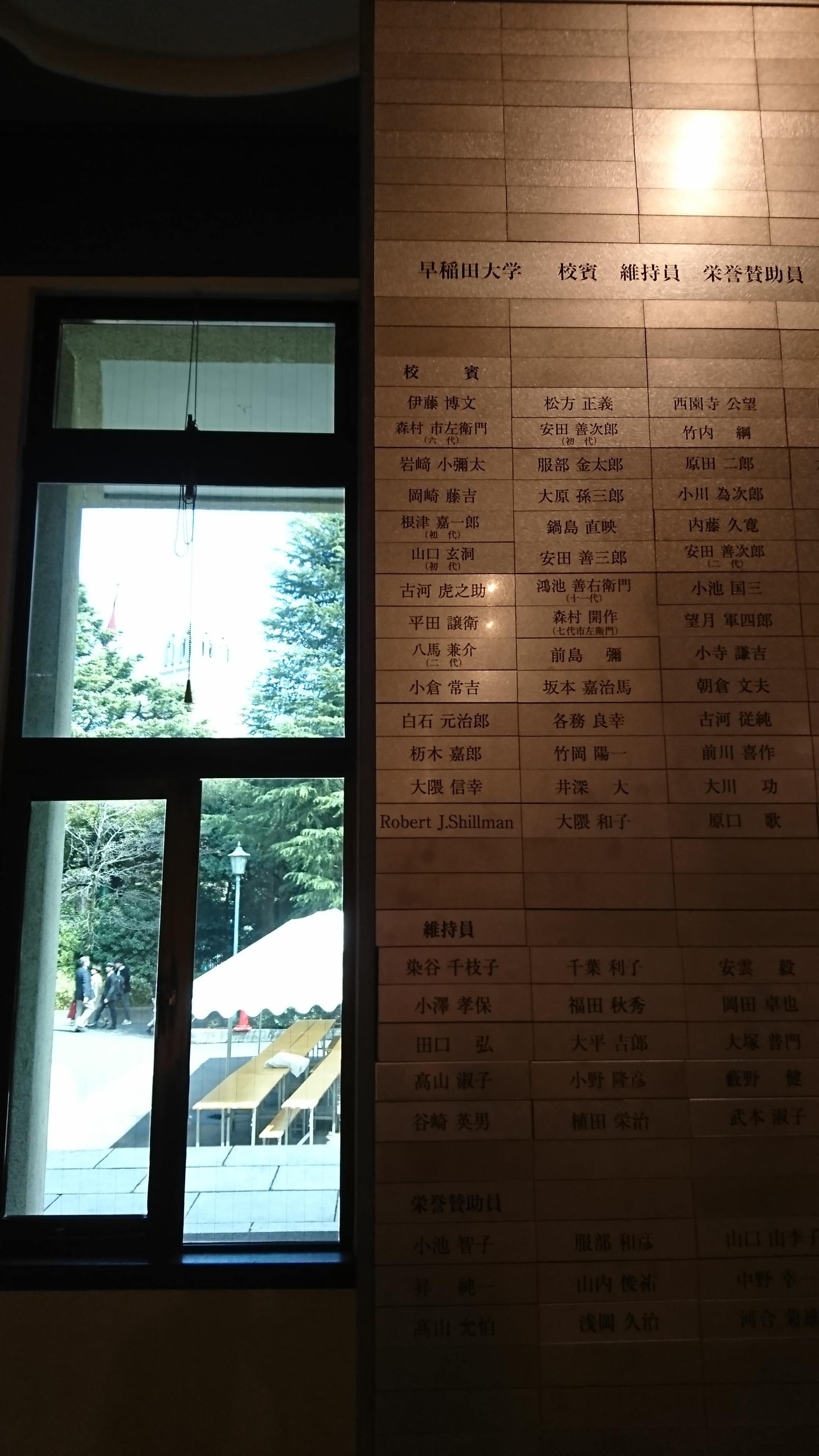 伊藤博文など早稲田大学の校賓銘板。